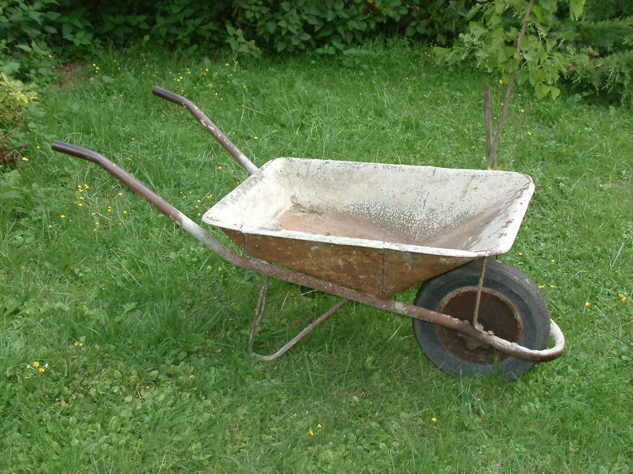 Brouette de chantier, France, seconde moitié du XXe siècle